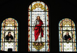 Johannes-Calvin-Kirche in Mannheim-Friedrichsfeld